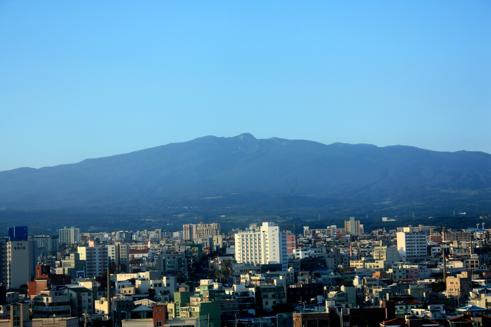 siehe [1]